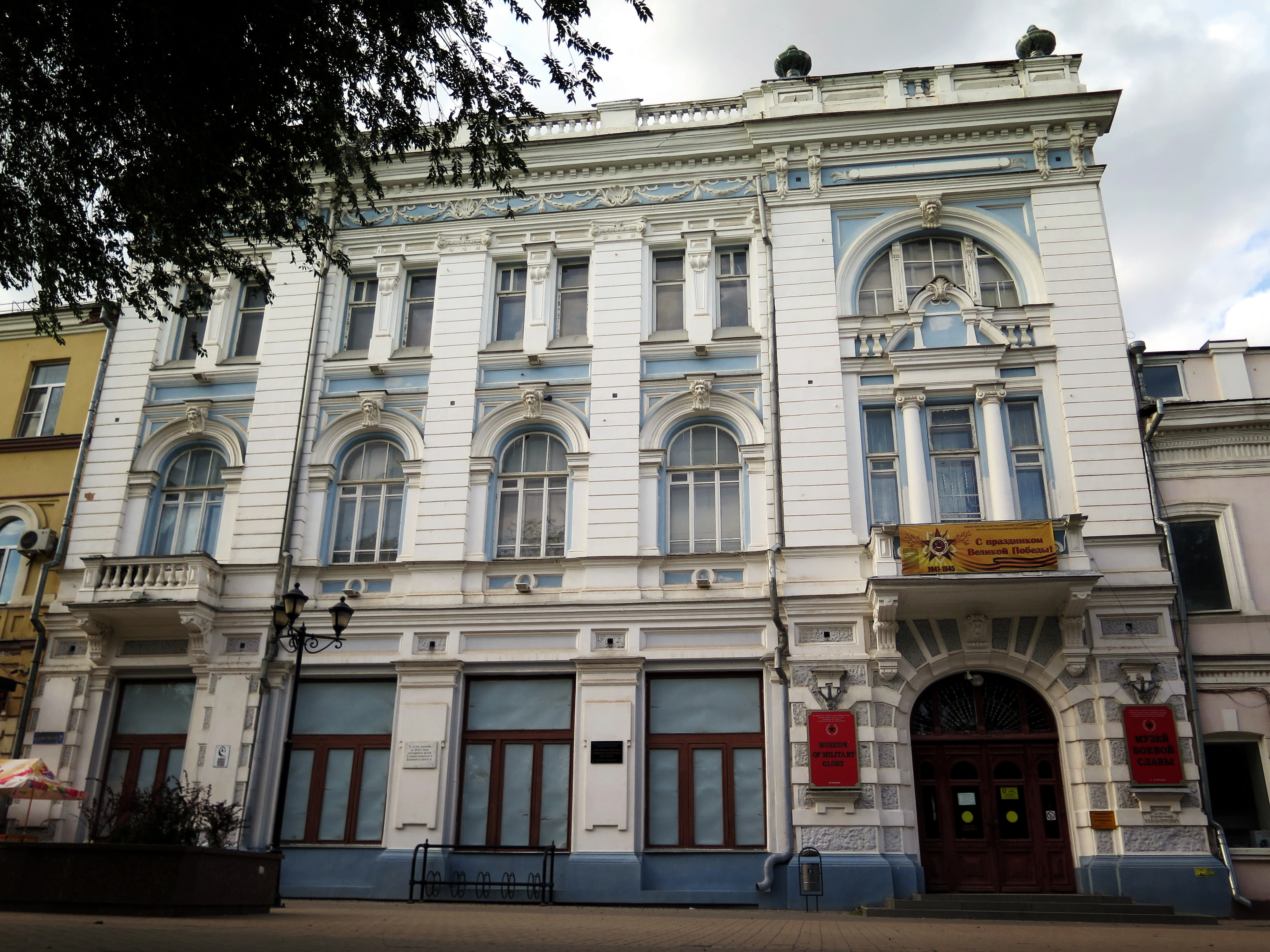 Здание правления: улица Ахматовская, 7, Астрахань, Астраханская область